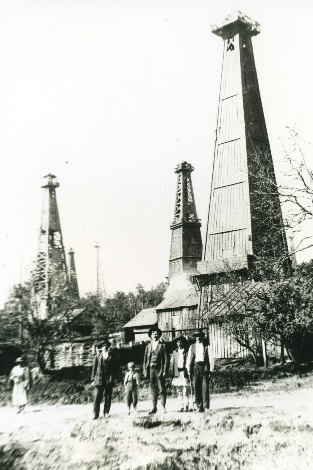 Petroliști în Moinești